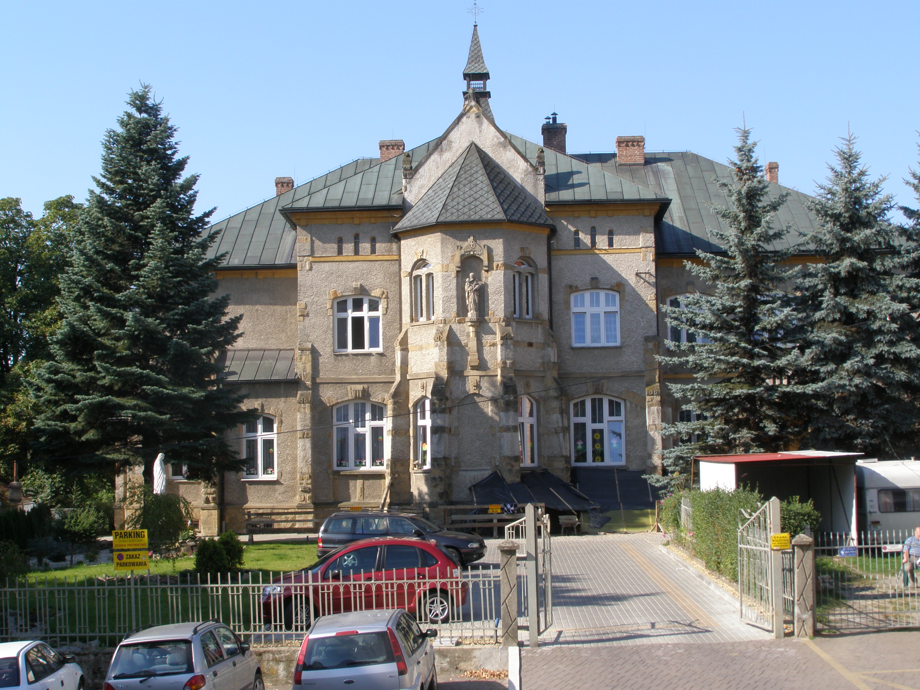 Dom dziecka Caritas w Krośnie, ul. Grodzka 2 05.1990.